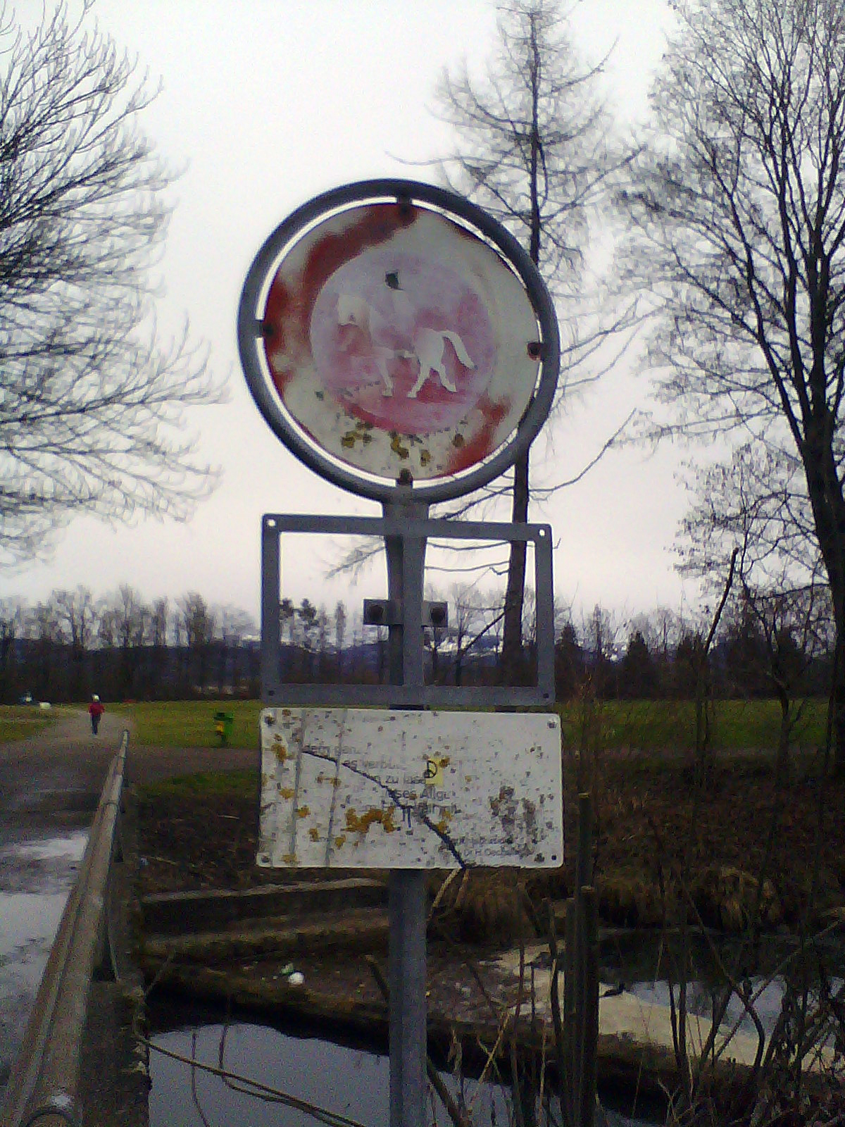 Verbotsschilder in Lachen, Kanton Schwyz